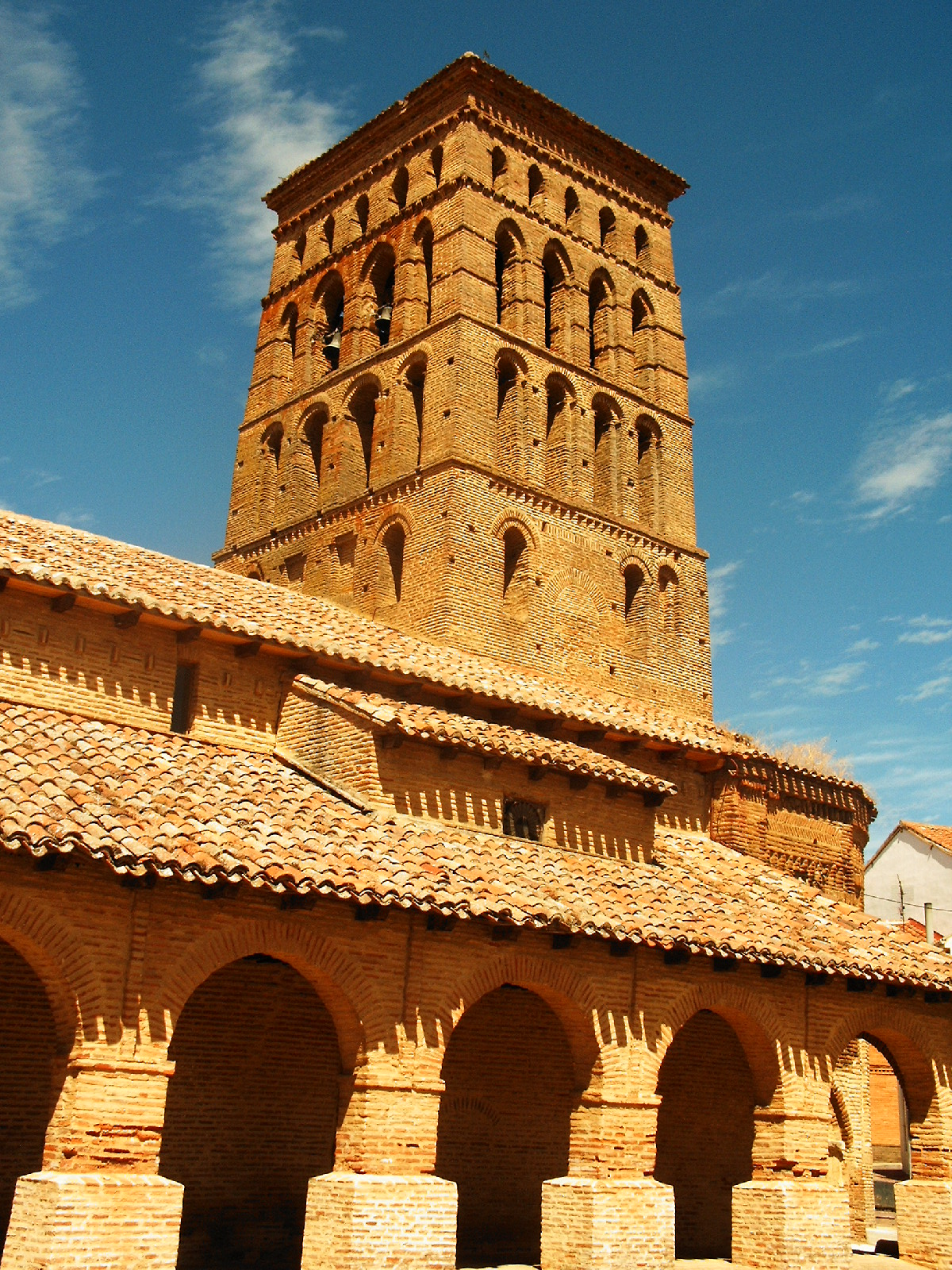 Torre de la iglesia de San Lorenzo en Sahagún, España.